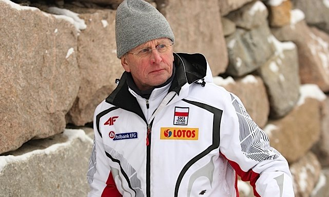 Hannu Lepistö podczas serii treningowej przed konkursem indywidualnym mężczyzn na Mistrzostwach Świata w Narciarstwie Klasycznym 2011 w Oslo.